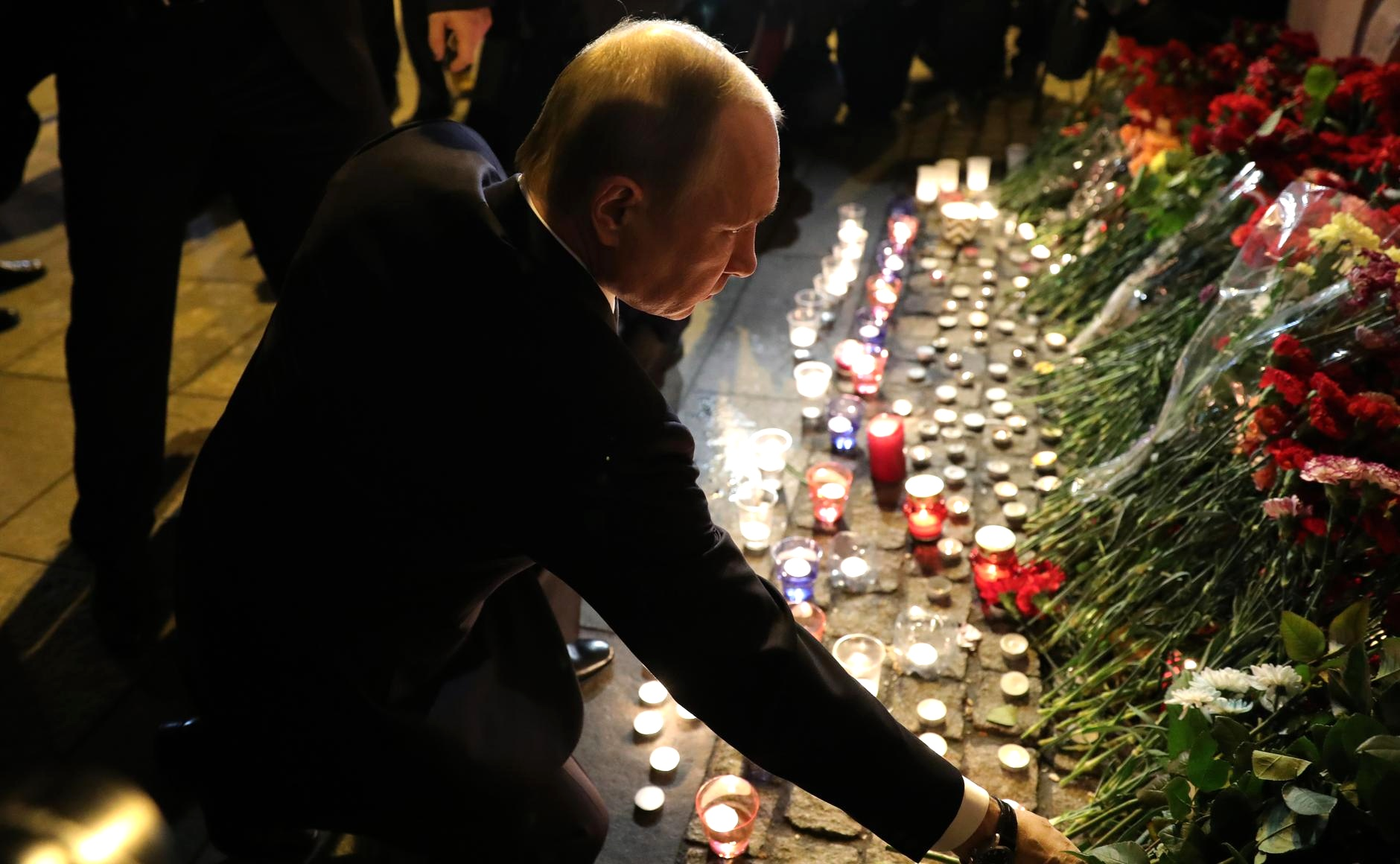 Президент России Владимир Путин почтил память погибших при взрыве в метро Санкт-Петербурга. Возложение цветов у станции метро «Технологический институт»